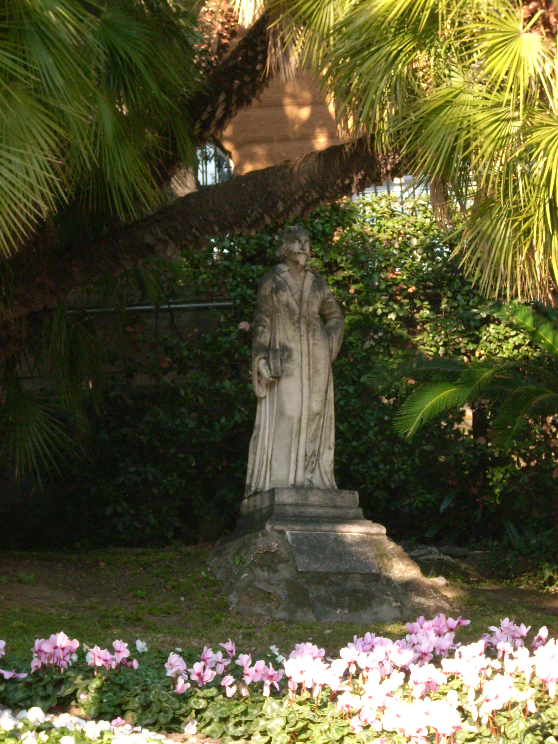 Statua di Giovanni Da Vigo a Rapallo, Liguria, Italia, opera di Carlo Rubatto.